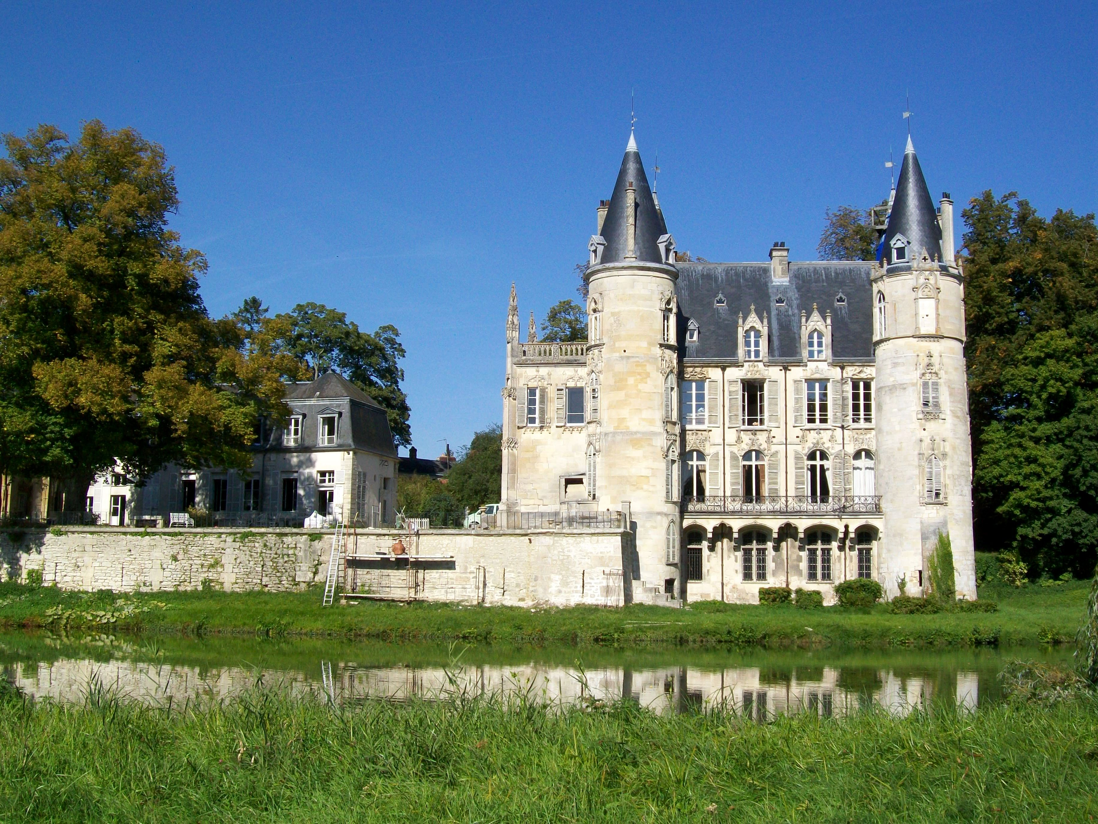 Château et pavillon des domestiques (à gauche, en retrait) depuis l'ancien parc, arrosé par la Nonette.